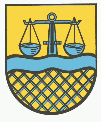 Wappen von Hefersweiler